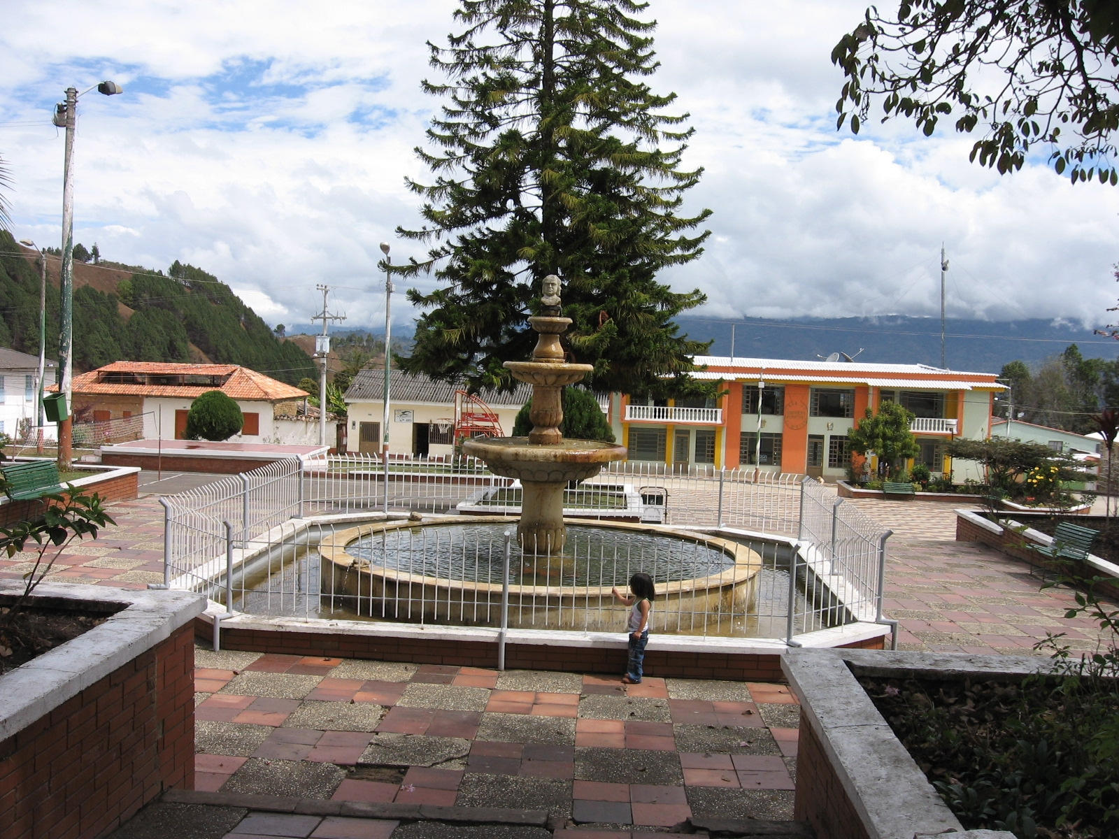 Fotografia del parque principal de Almeida Boyacá Colombia